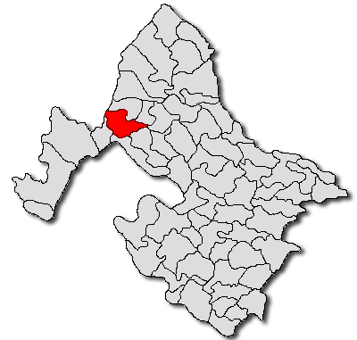 Categorie:Hărţi ale judeţului Mehedinţi